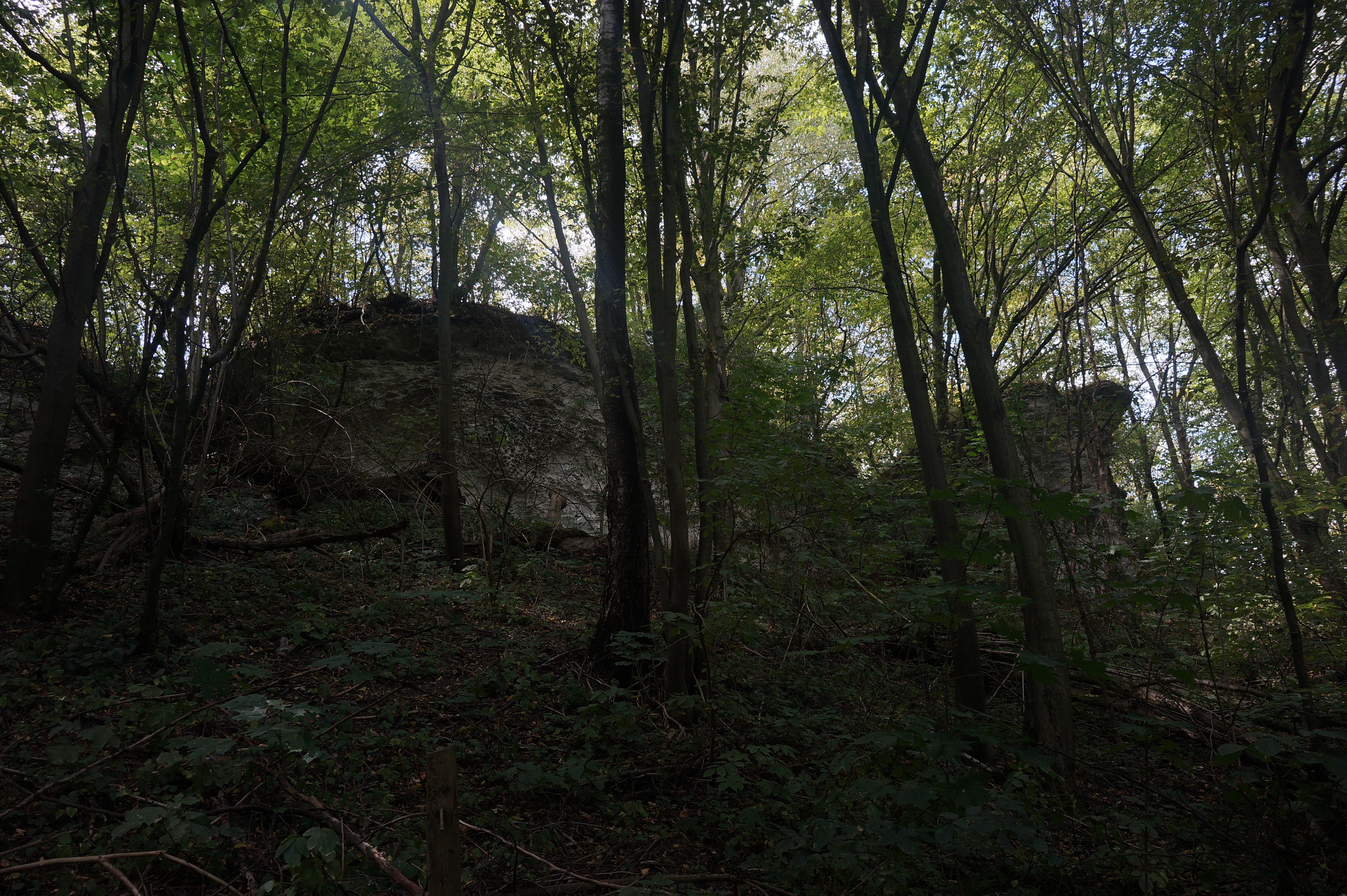 Скелі розташовані на захід від об'їзної вулиці Осовиця.